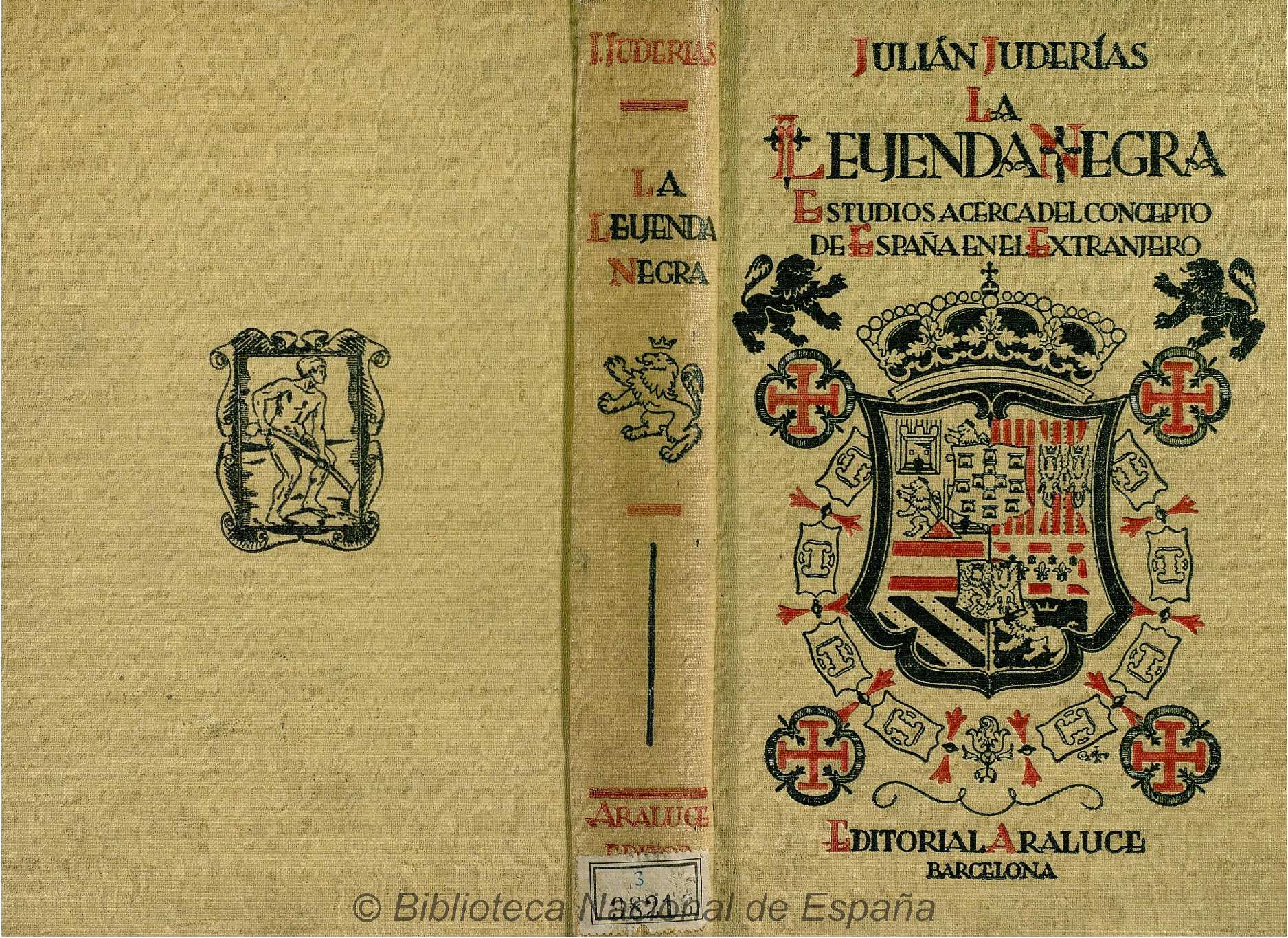 La leyenda negra : estudios acerca del concepto de España en el extranjero, Julián Juderías Autor: Juderías, Julián (1877-1918) Fecha: 1943 Datos de edición: Barcelona, Araluce